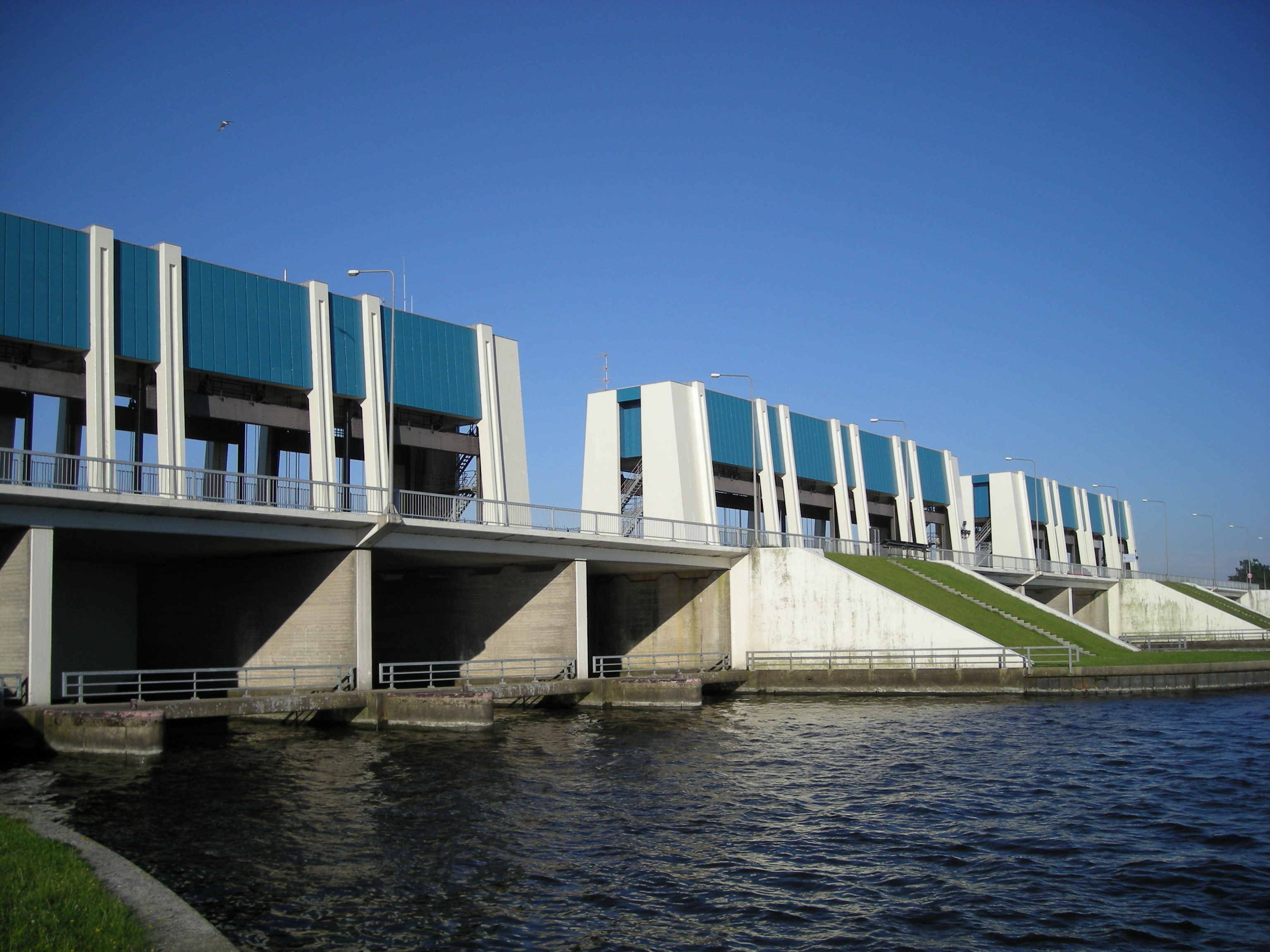 Lauwerssluizen